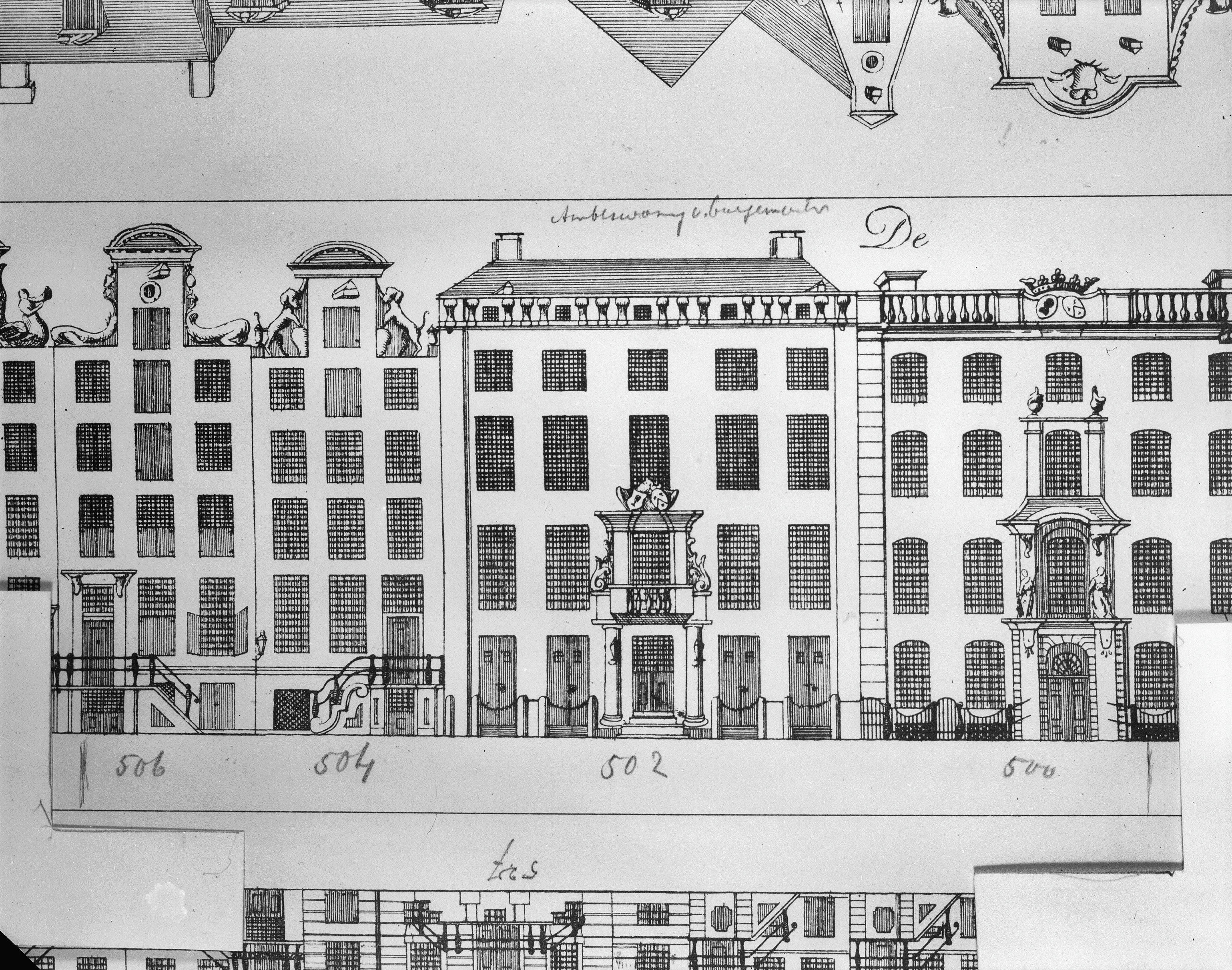 reproductie uit boek geb.Heeren- en Keizersgracht A'dam Bibliotheek Monumenten zorg